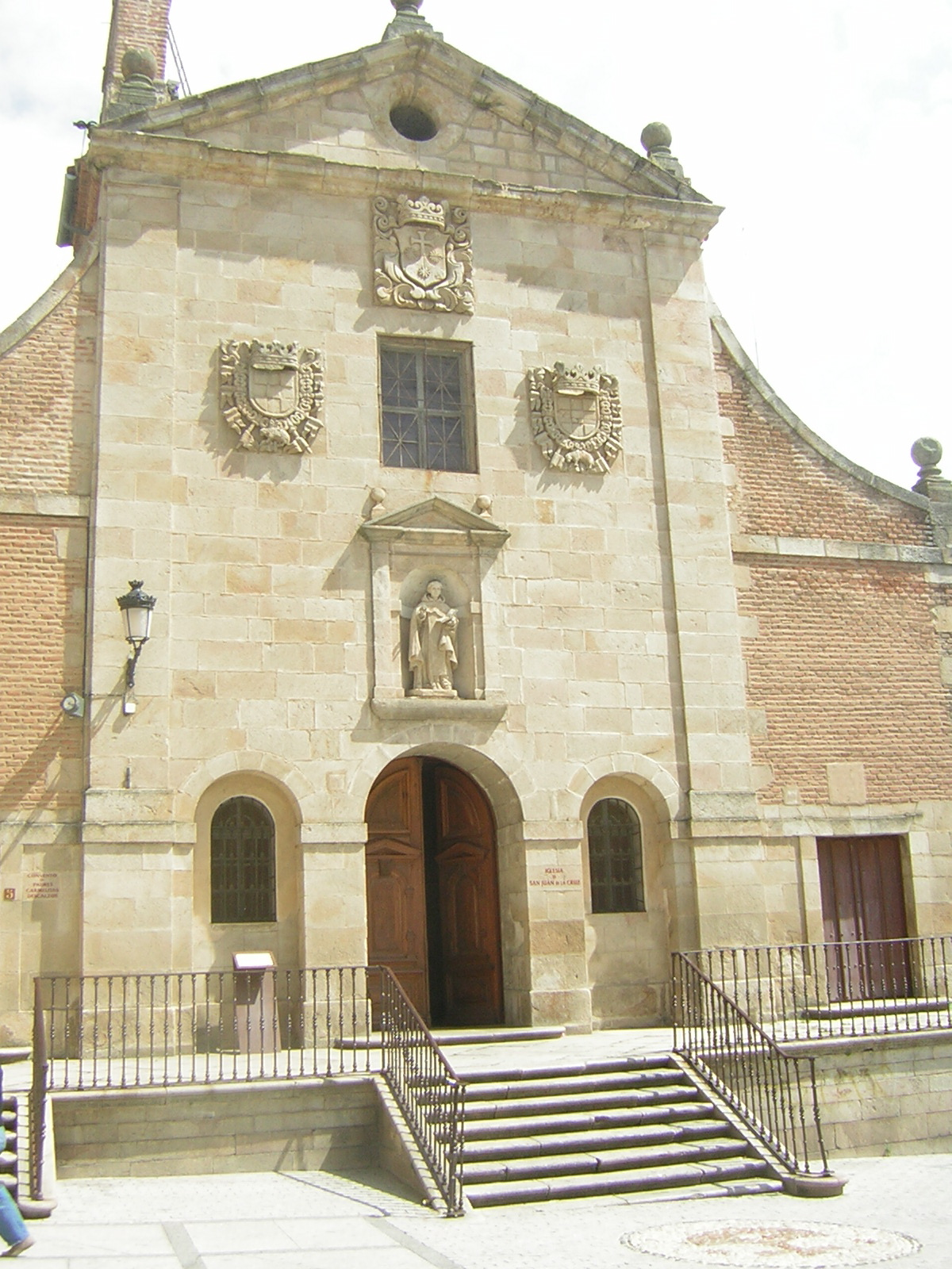 Iglesia de San Juan de la Cruz, Alba de Tormes.